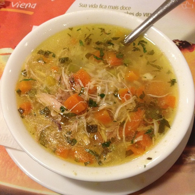 Alguém aceita uma canja de galinha? #canjadegalinha #vaigordinho #viena